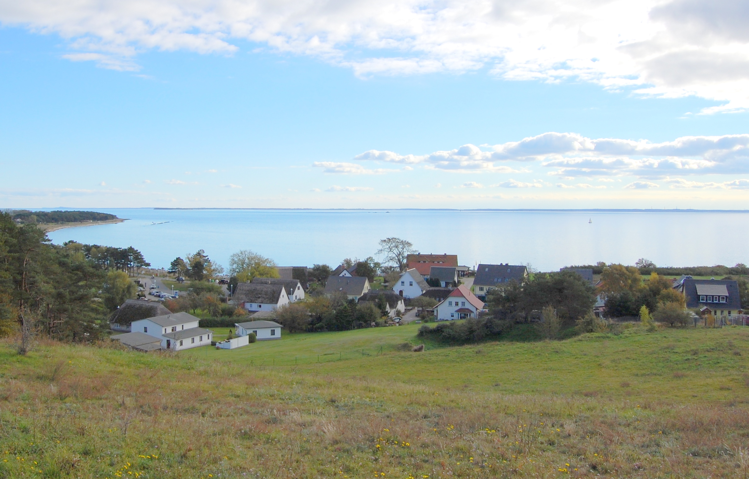 Blick über den östlichen Teil des Dorfes Klein Zicker